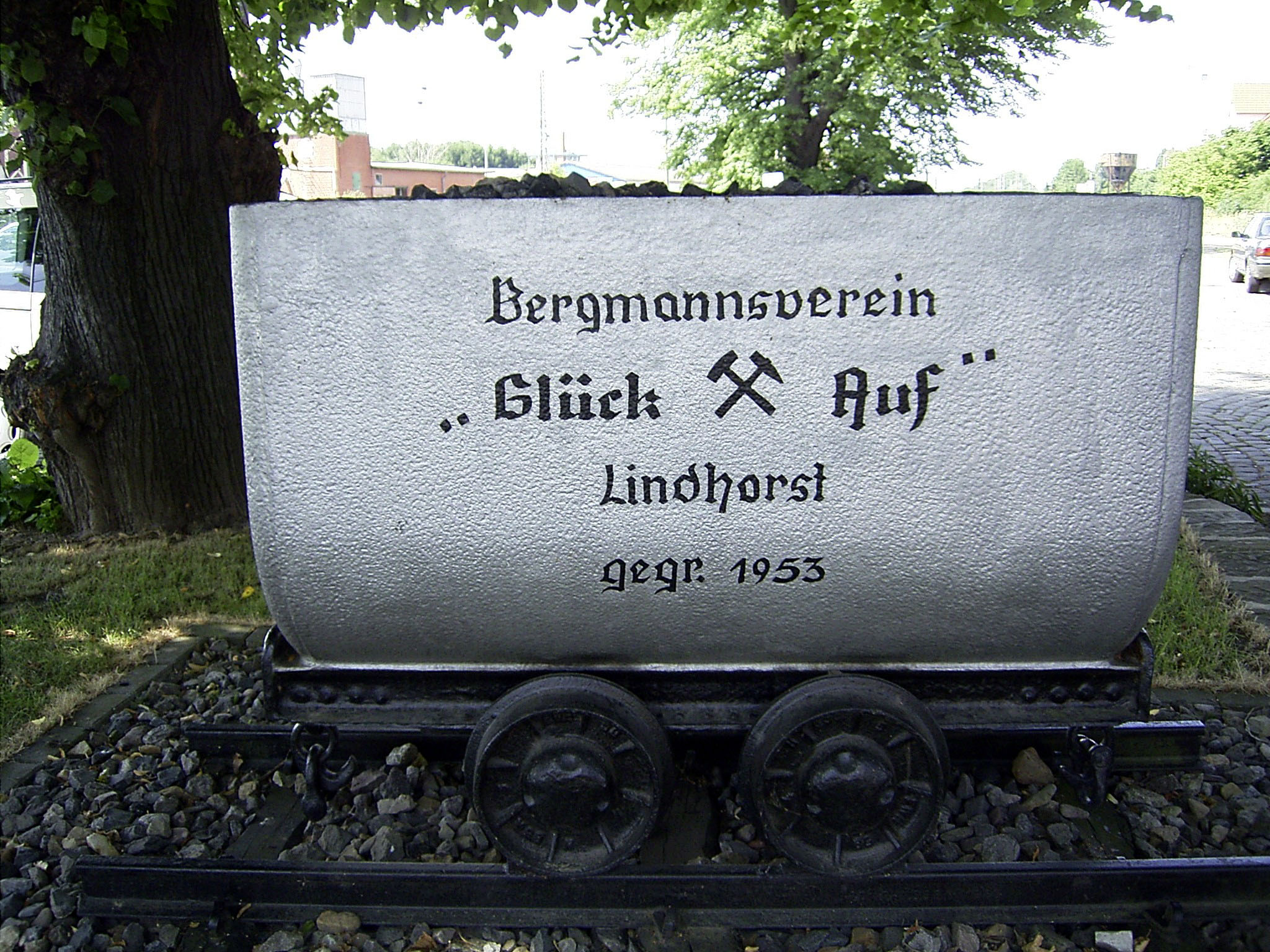 Die Lore am Lindhorster Bahnhof erinnert an den ehemaligen Bergbau in der Region.